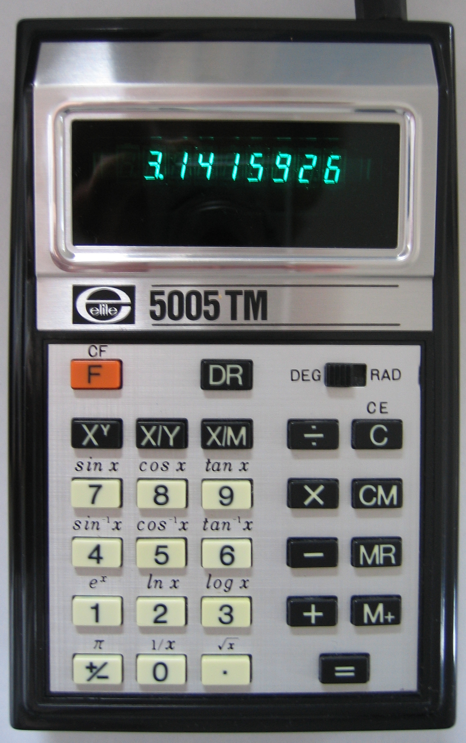 Description in de wikipedia Beschreibung: Taschenrechner elite 5005TM. Beschreibung des Taschenrechners: Zeitliche Einordnung: Ende der 60er bis Anfang der 70er Jahre des 20. Jahrhunderts Zifferndarstellung mittels Vakuumfluoreszenzanzeige Stromversorgung: 4 Batterien vom Typ AA oder über Netzgerät 6V / 100 mA Lizenzstatus: GNU FDL